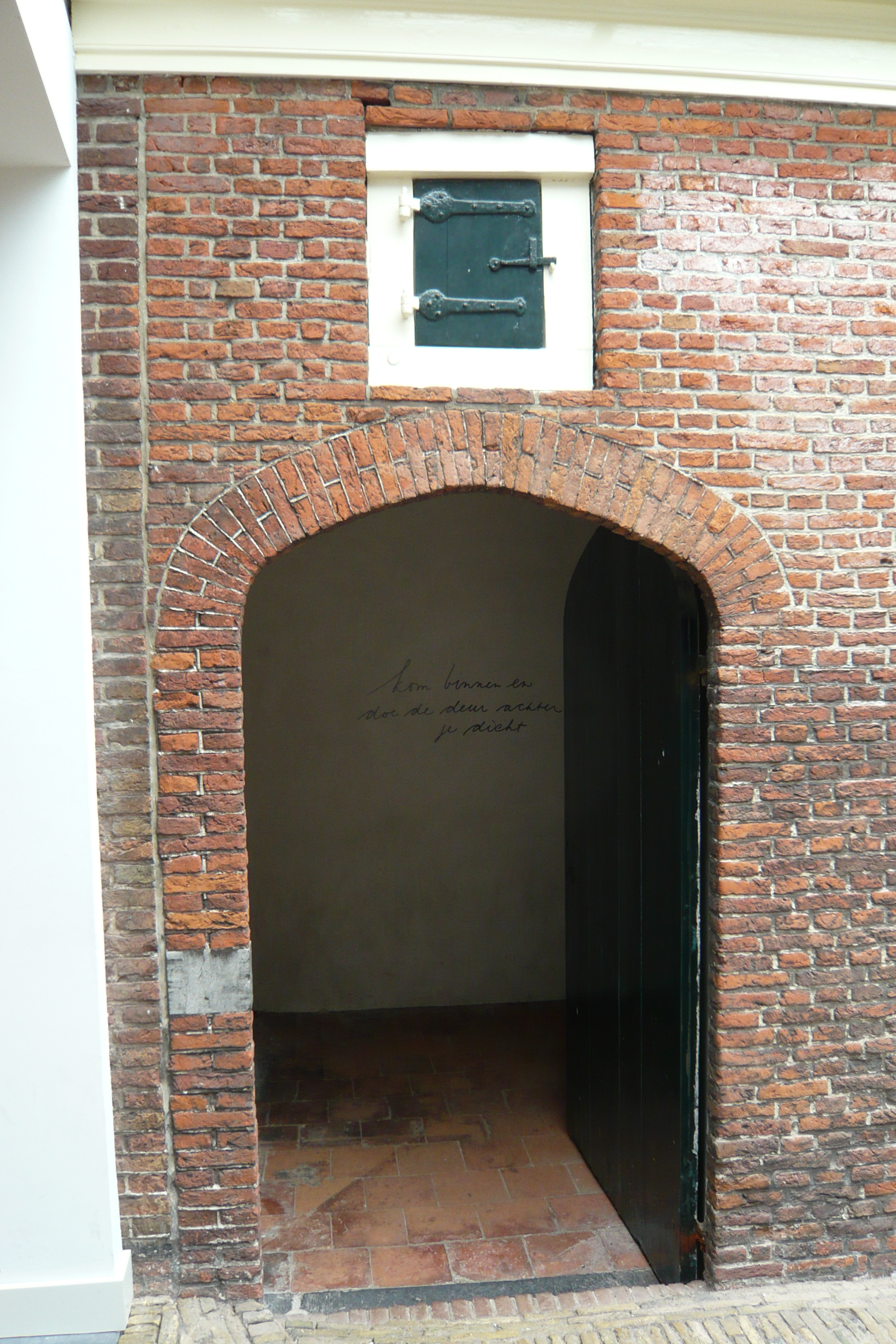 Het Dolhuys in Haarlem, Museum voor Psychiatrie. Dolcell.